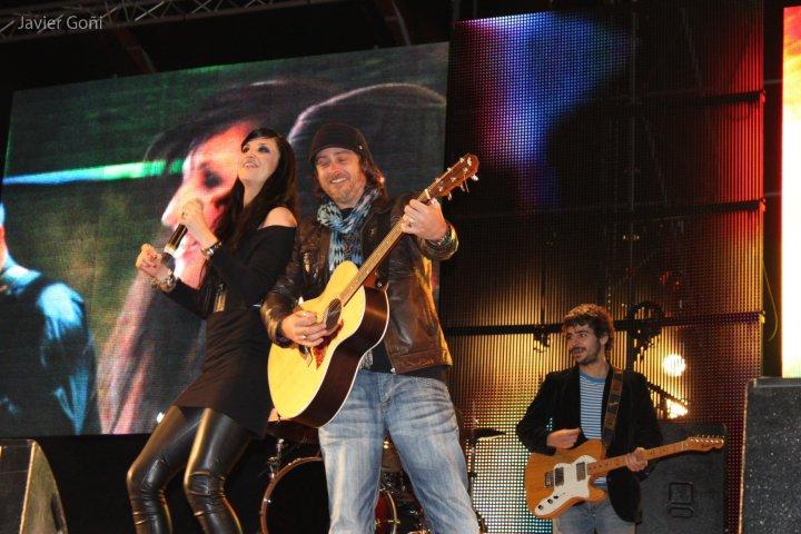 Efecto Mariposa actuando en el Primavera Pop 2010 en Barcelona.